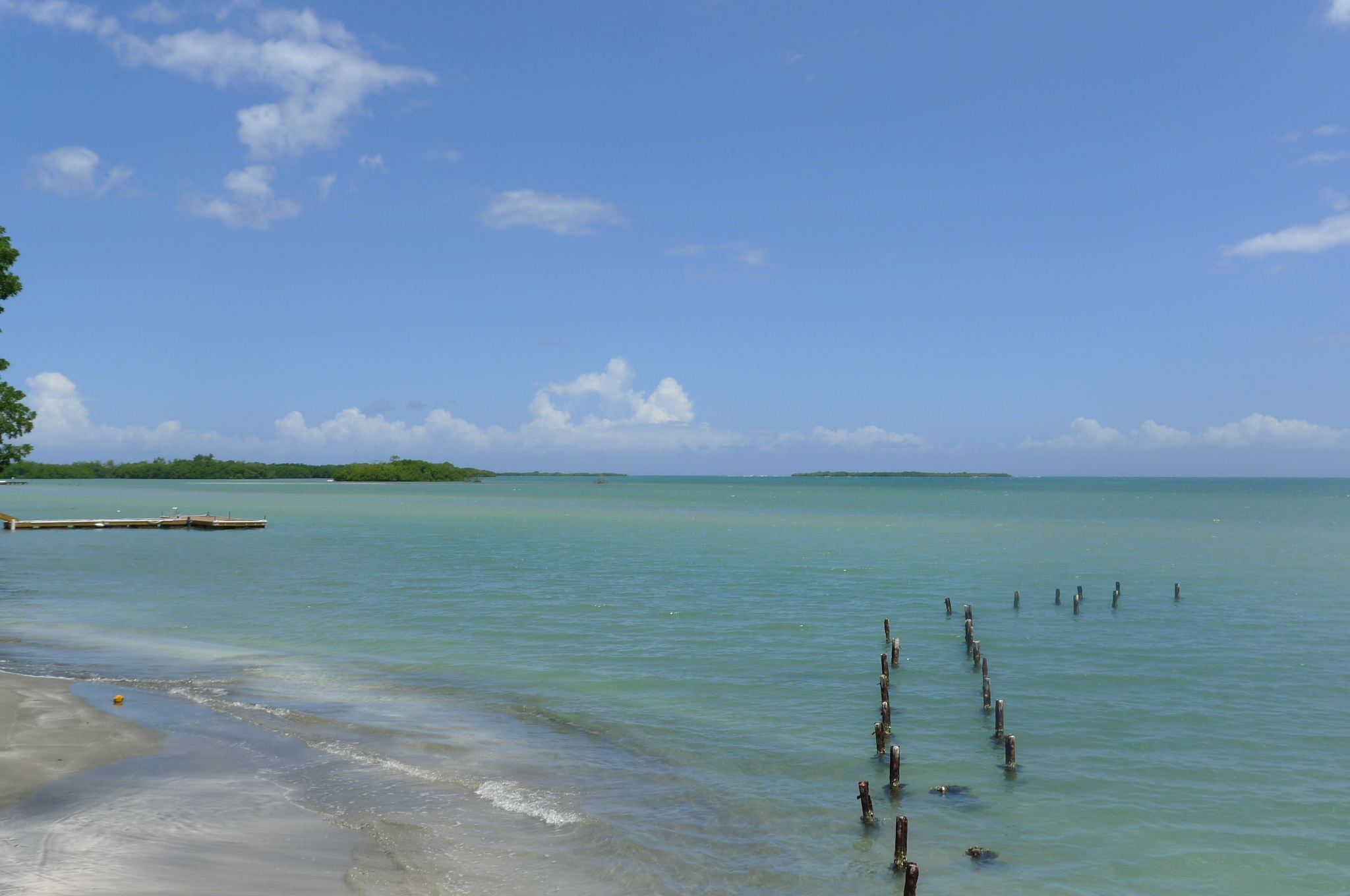 Río Jueyes, Salinas, Puerto Rico